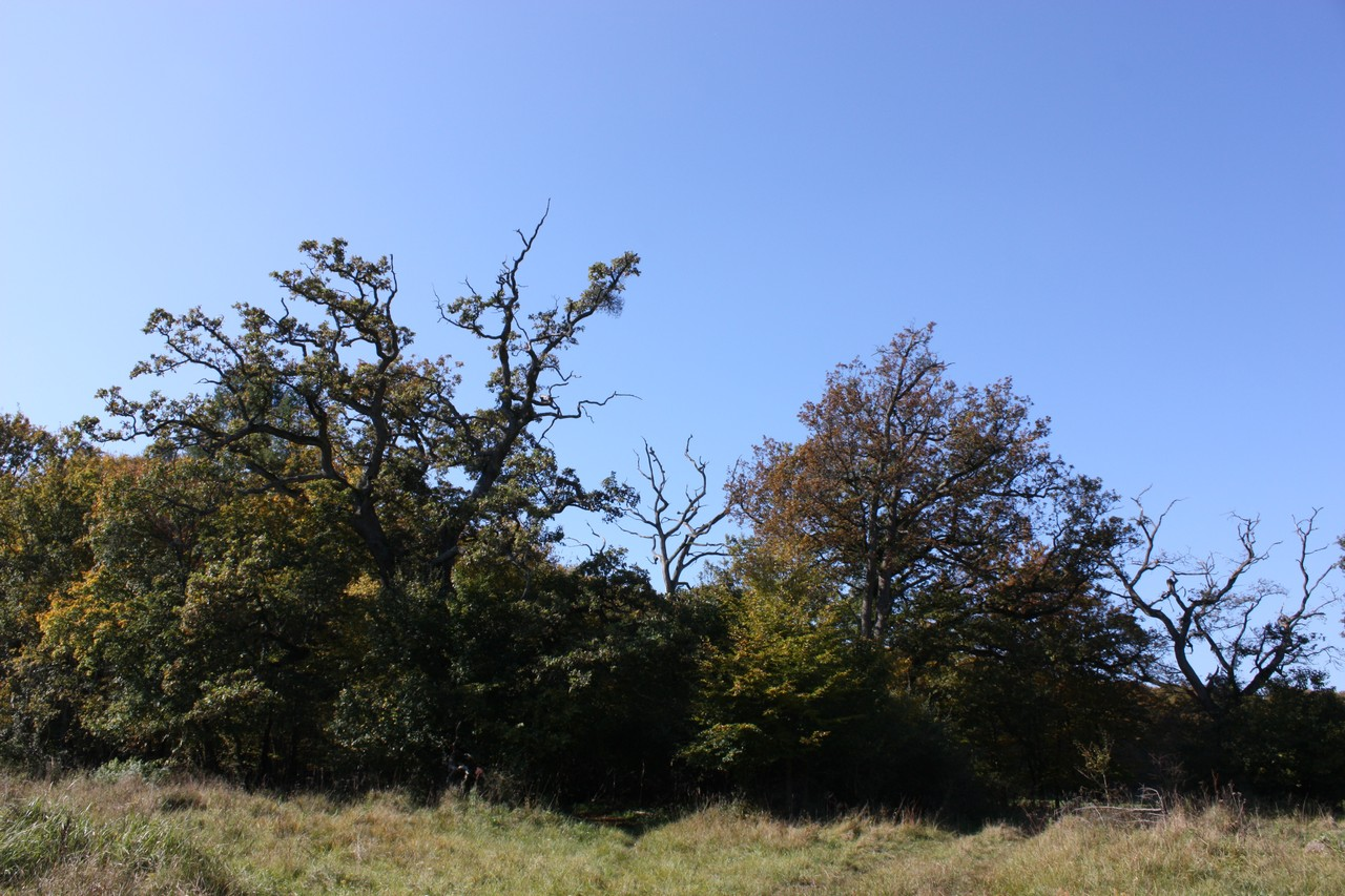 Okšovské duby 011